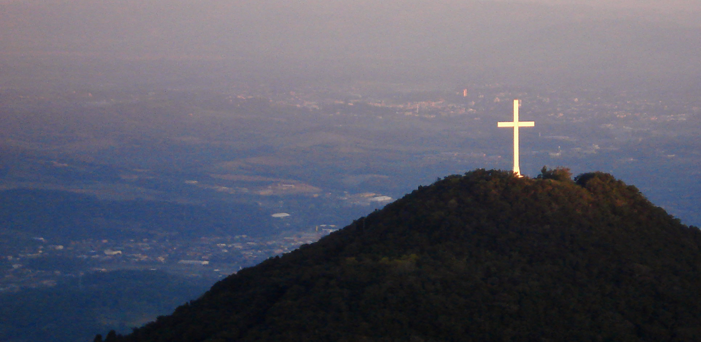 Monte da Fé (Morro da Cruz) em Igrejinha, Rio Grande do Sul, Brasil. Em segundo plano as cidades de Igrejinha e Taquara.